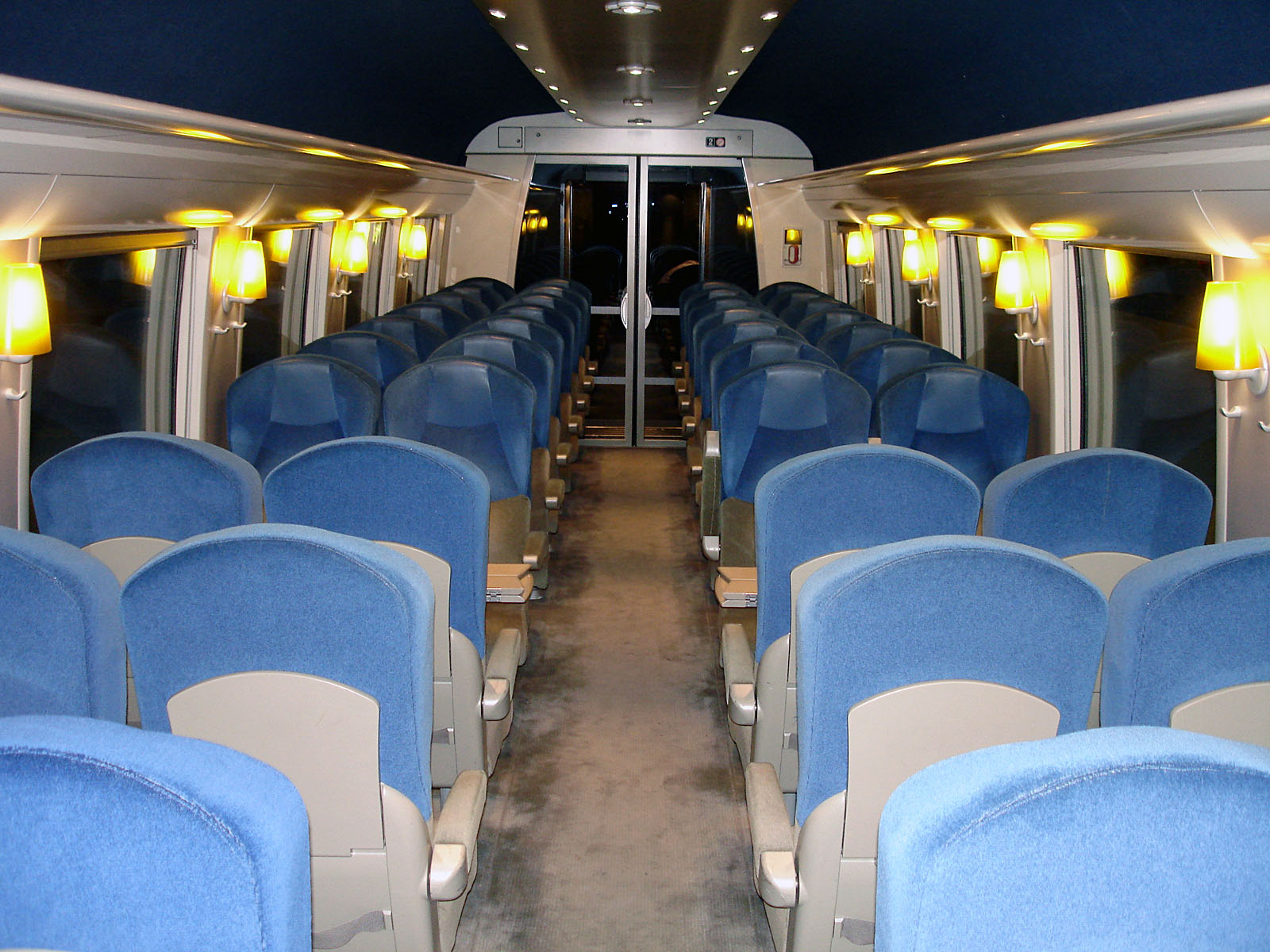 Z 21500 en gare de Paris-Austerlitz, France. Intérieur de 2ème classe.